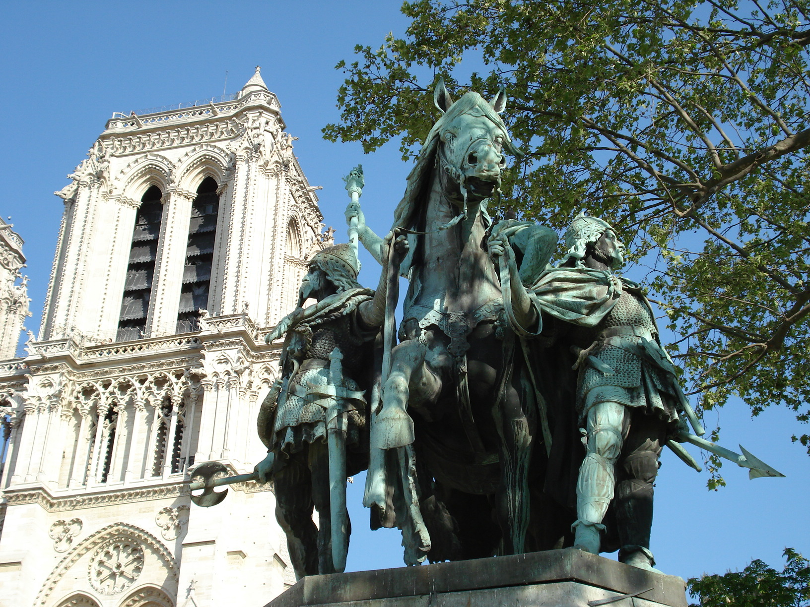 Statue représentant Charlemagne sur le parvis de Notre-Dame (Paris), avec la cathédrale au fond.Unknown